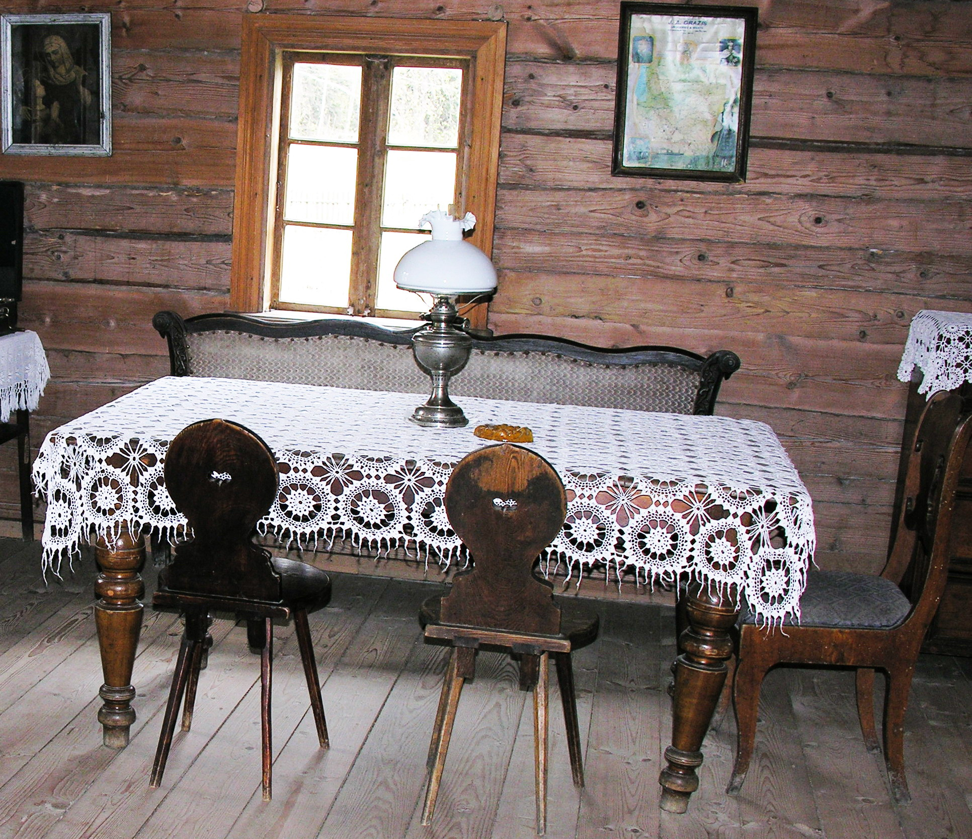 Stalas 2007-04-21, Lietuva